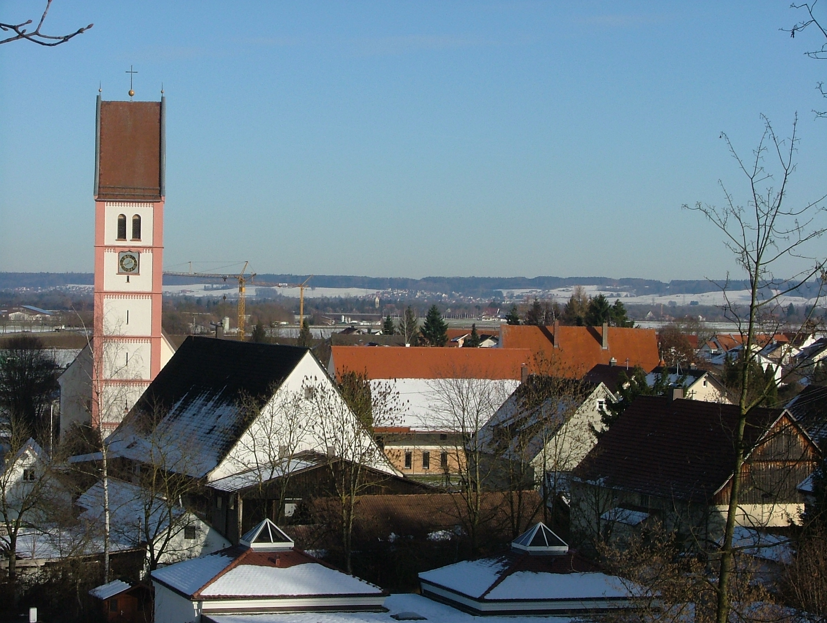 Berkheim Blick über das Illertal nach ?